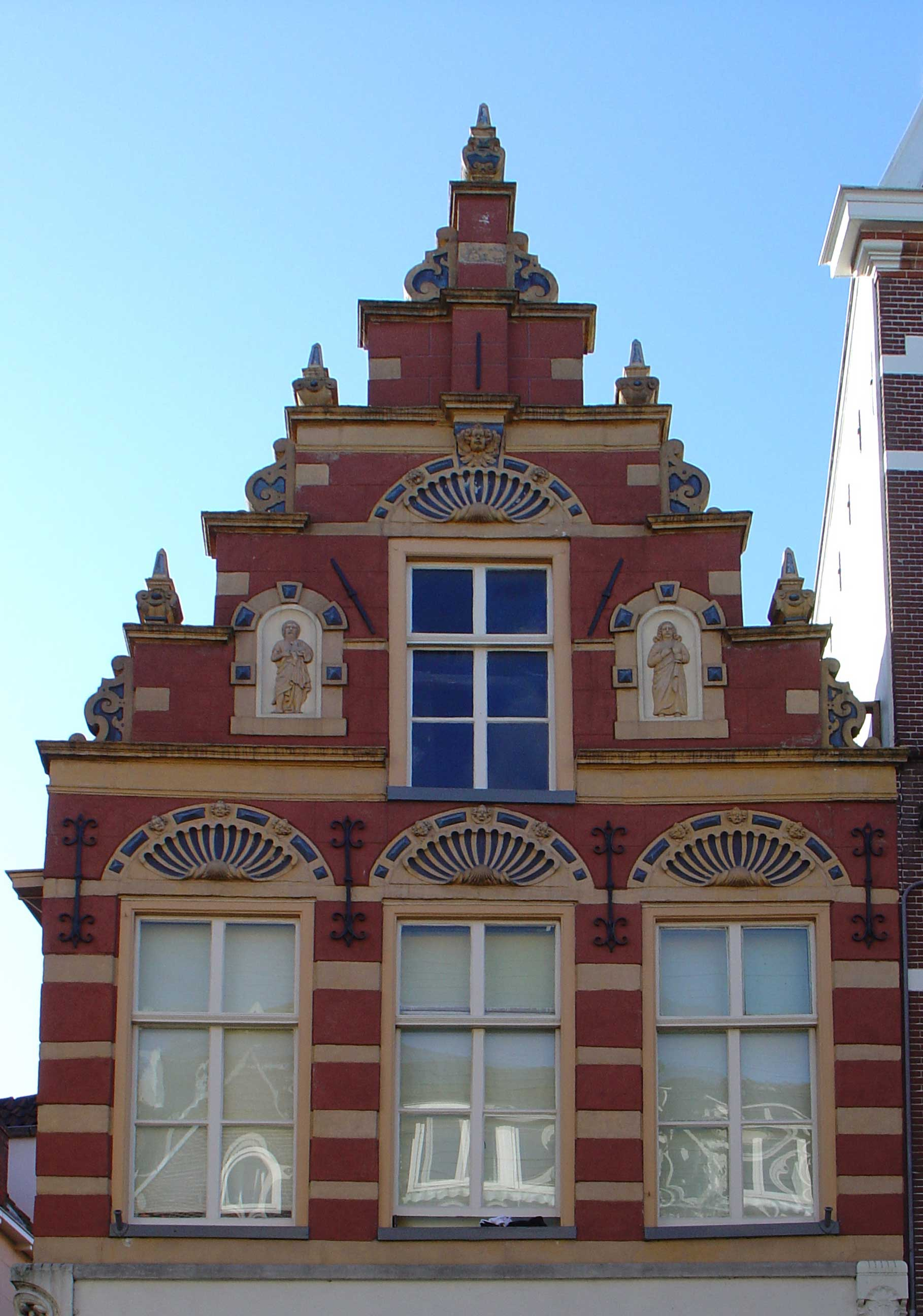 Oude Ebbingestraat (hoek Butjesstraat) Groningen, met reliëfs van Johannes de Doper en Johannes de Evangelist